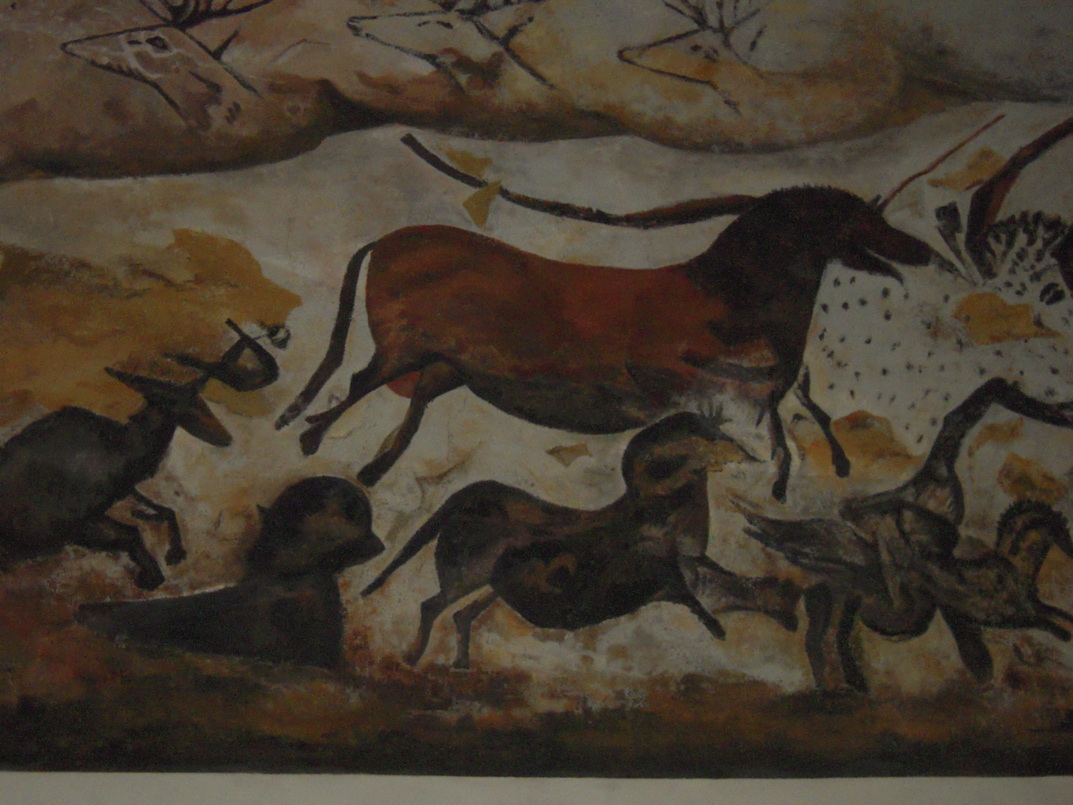 Inauguré en 1898, la galerie de Paléontologie et d’anatomie comparée a été voulue par les professeurs Albert Gaudry et George Pouchet. Le nouveau bâtiment a ainsi abrité des collections venant de plusieurs laboratoires, ou collections. Son originalité, à l’époque, tenait au fait que ce musée n’exposait pas toute les collections qu’il possédait. Le conservateur opérait donc une sélection qu’il présentait au public. Ce mode de présentation a depuis été adopté par tous les musées contemporains.